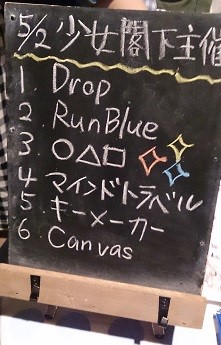 amiinaセトリボード(20150502(1))